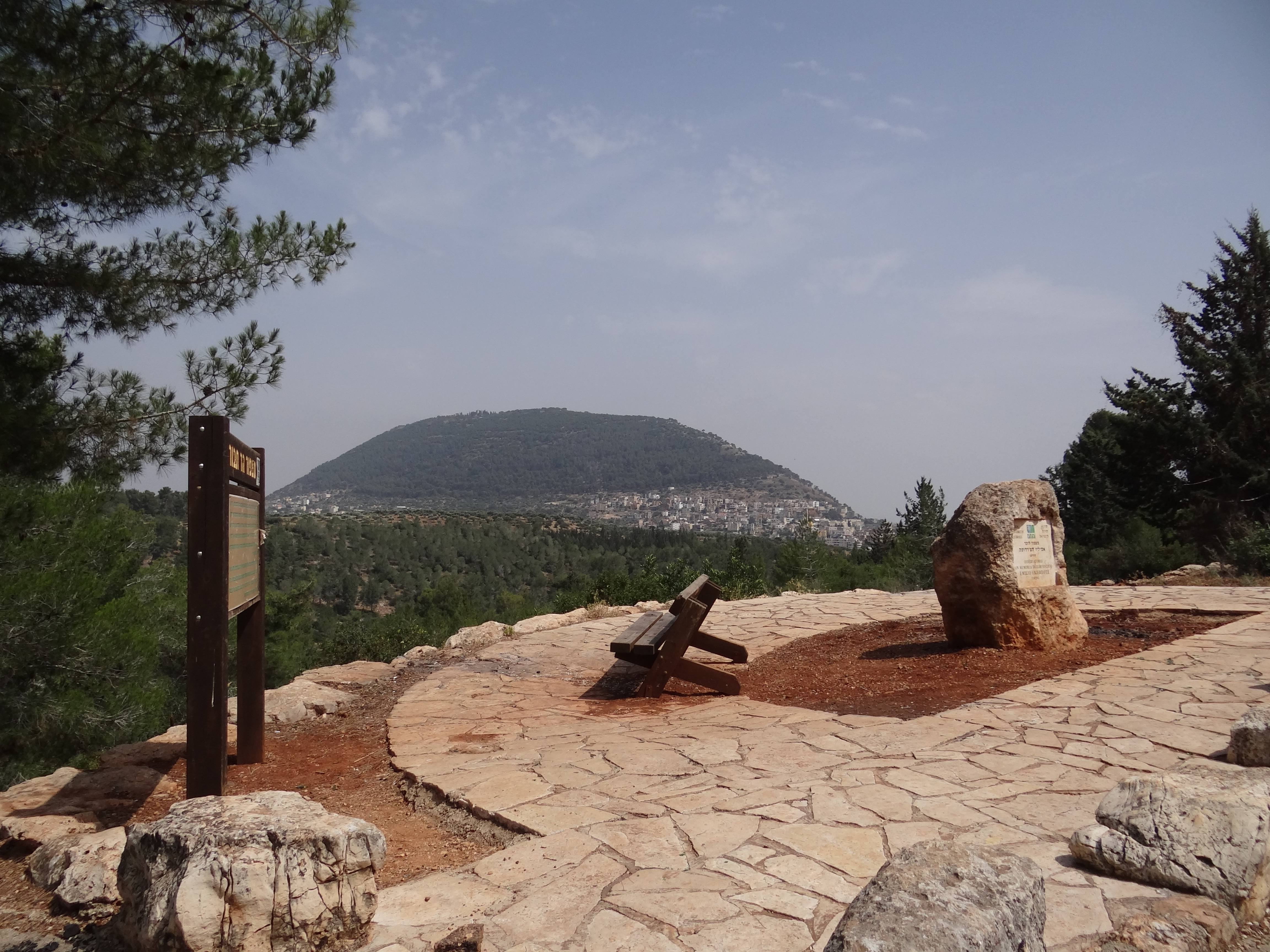 מצפור הר תבור בדרך נוף יער בית קשת משקיך על הר תבור